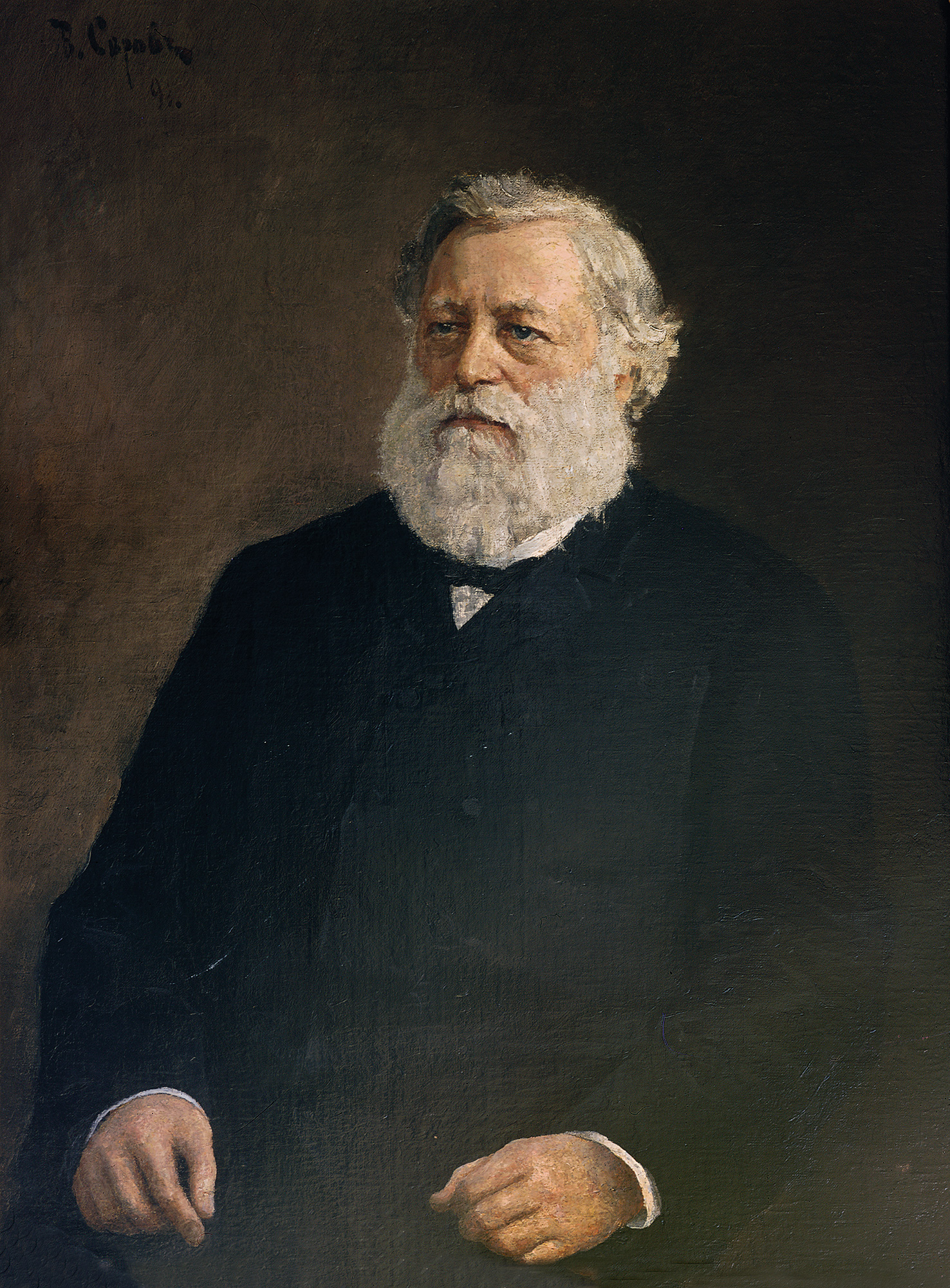 Портрет Т.С. Морозова 1891 Холст, масло 97.7 × 76 cm